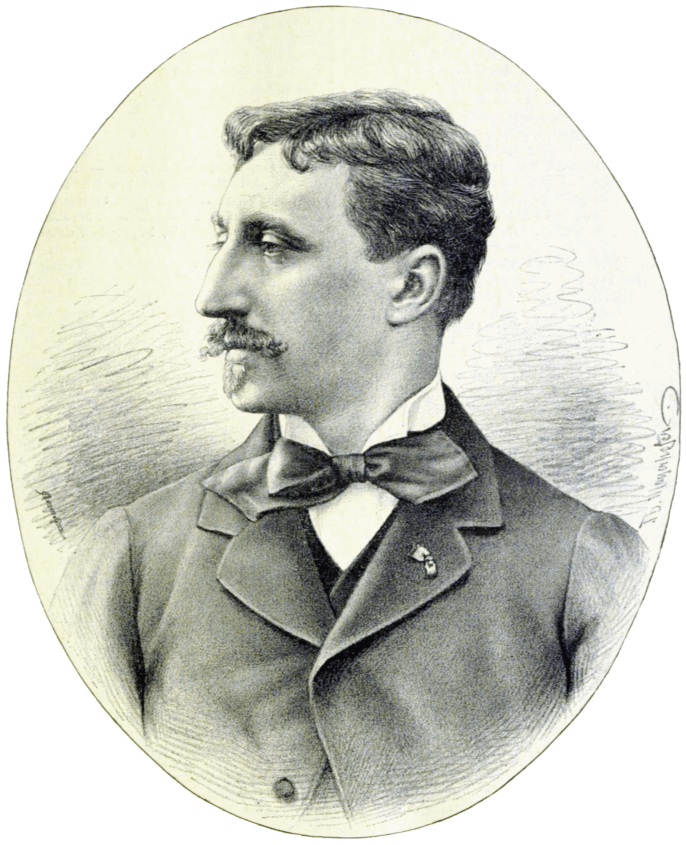 Jean Baptiste Édouard Detaille (1848–1912), French painter